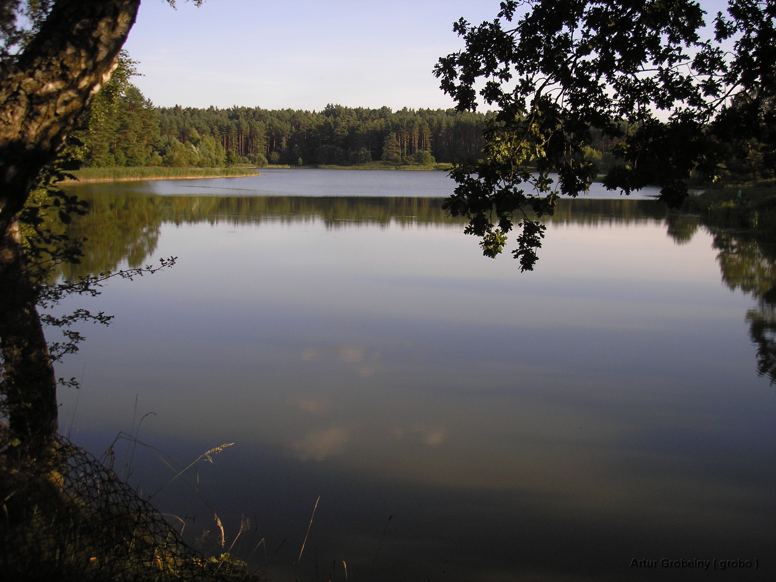 Zalew Polanowski 2012